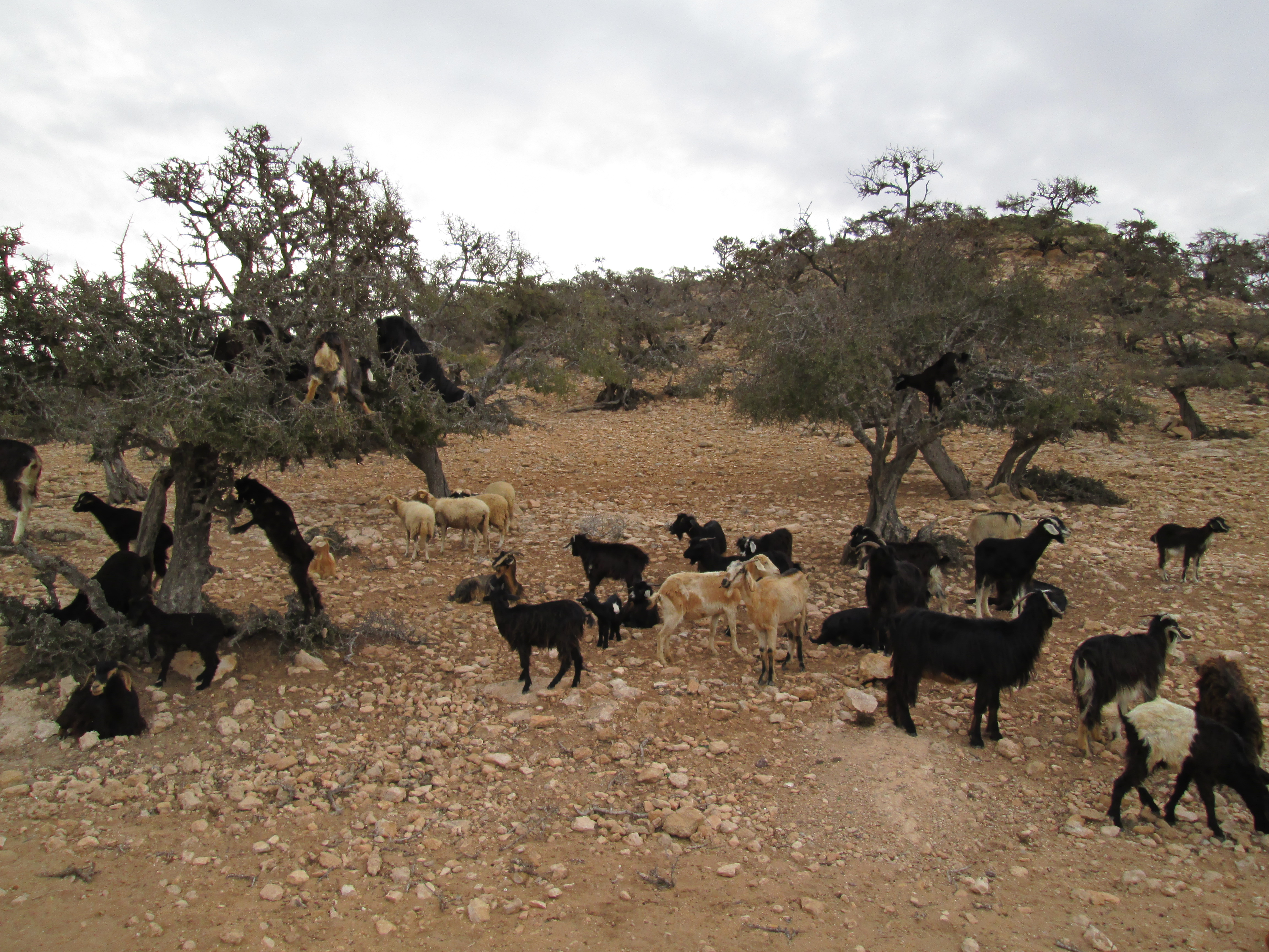 Ziegen lieben die Früchte der Arganbäume, die weit verbreitet in Marokko wachsen. Um an diese Argannüsse heran zu kommen, klettern sie bis in die Spitzen der Bäume.